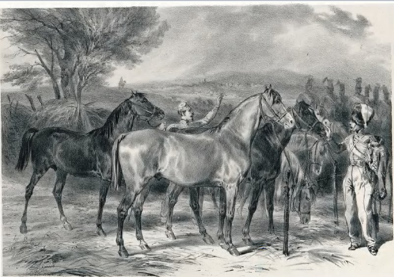 Gravure du cheval Angevin dans l'Atlas statistique de la production de chevaux en France